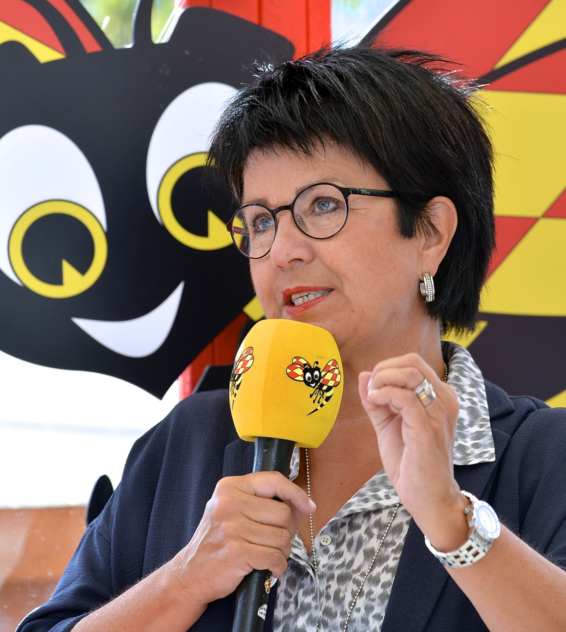 Eva-Lis Sirén utfrågas på Expressens valscen på Sergels torg i Stockholm den 9 september 2014.